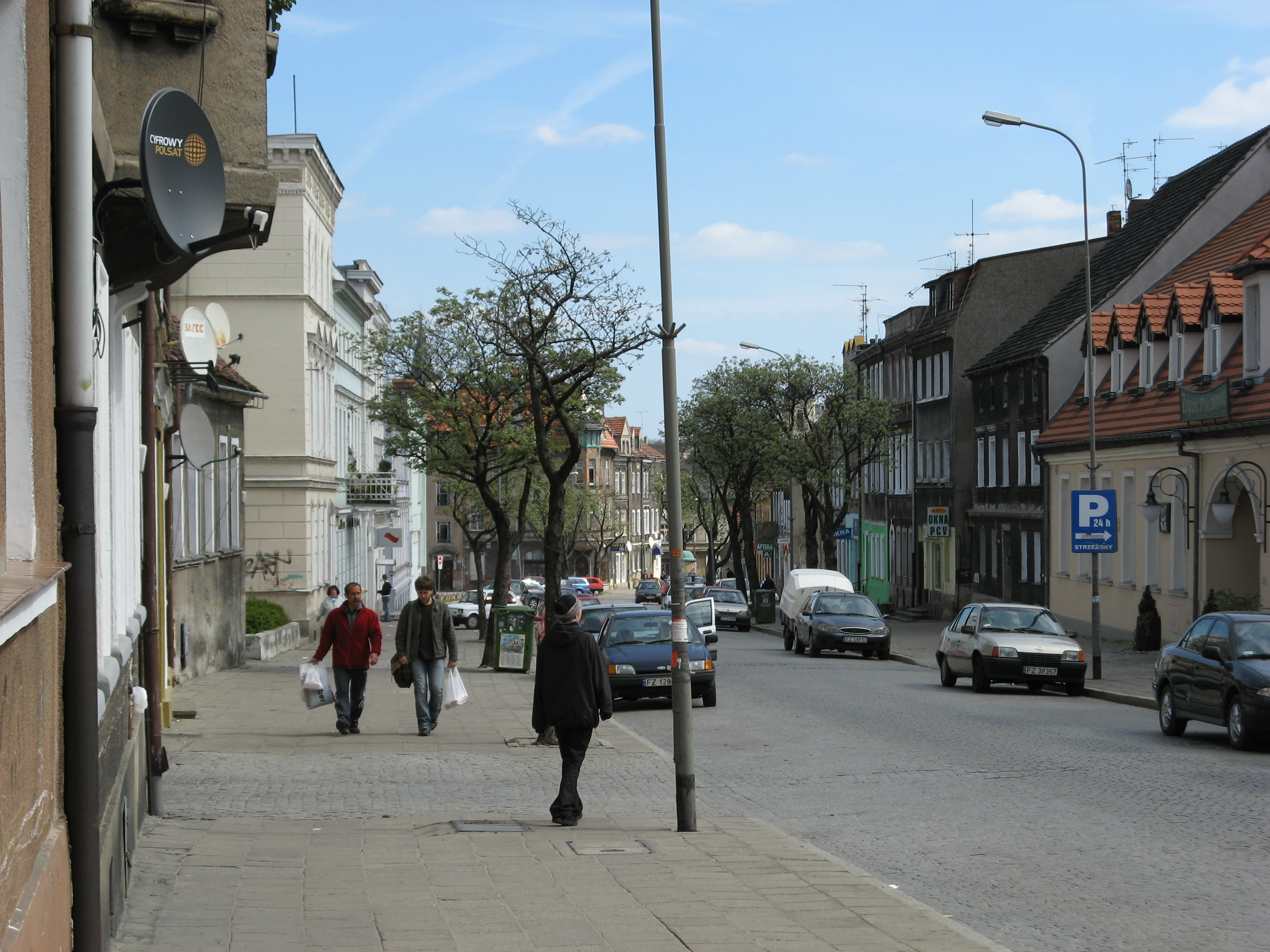 Zielona Góra - ulica Jedności